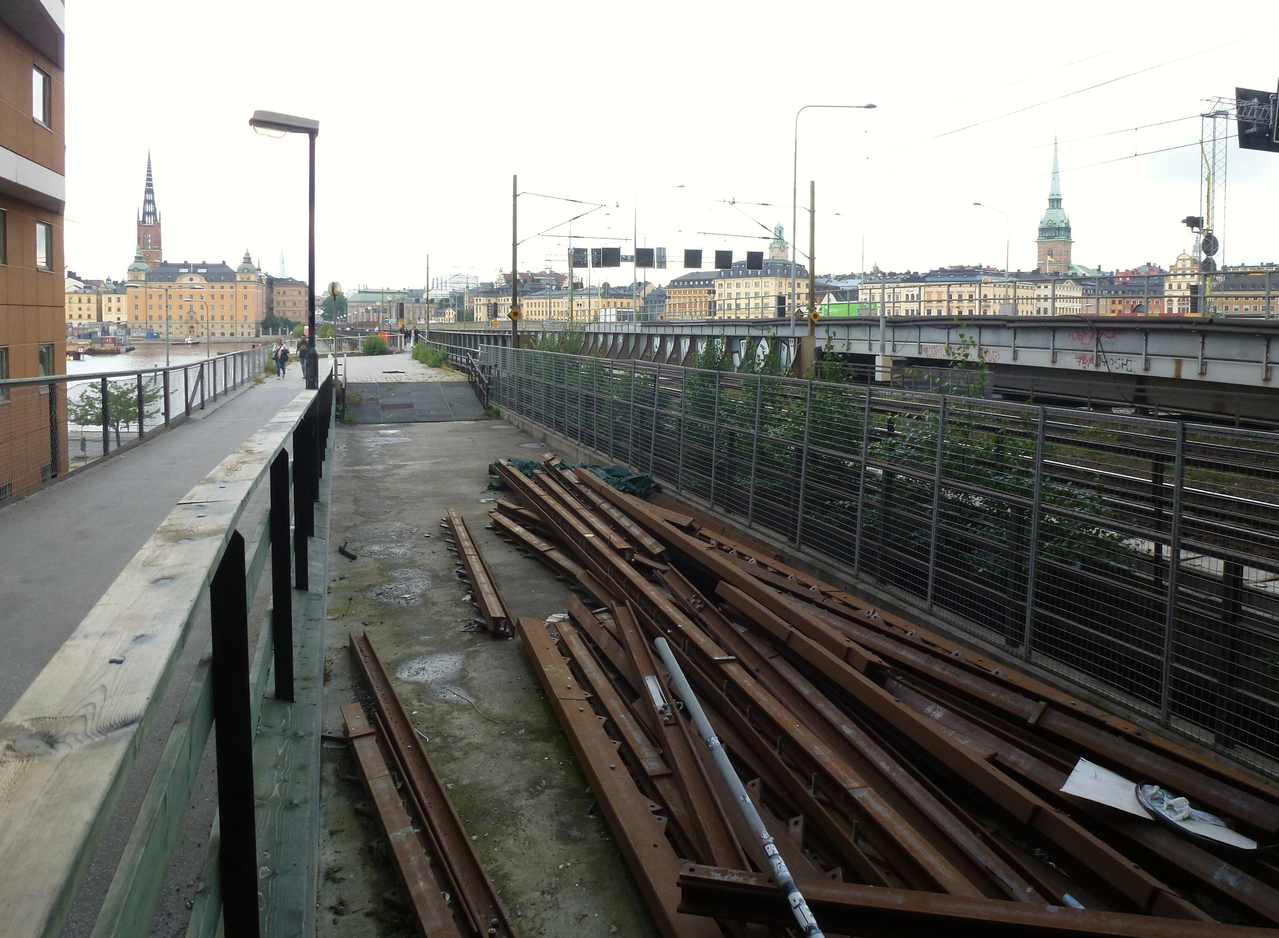 Det ofullbordade "Tredje spåret", vy mot norr